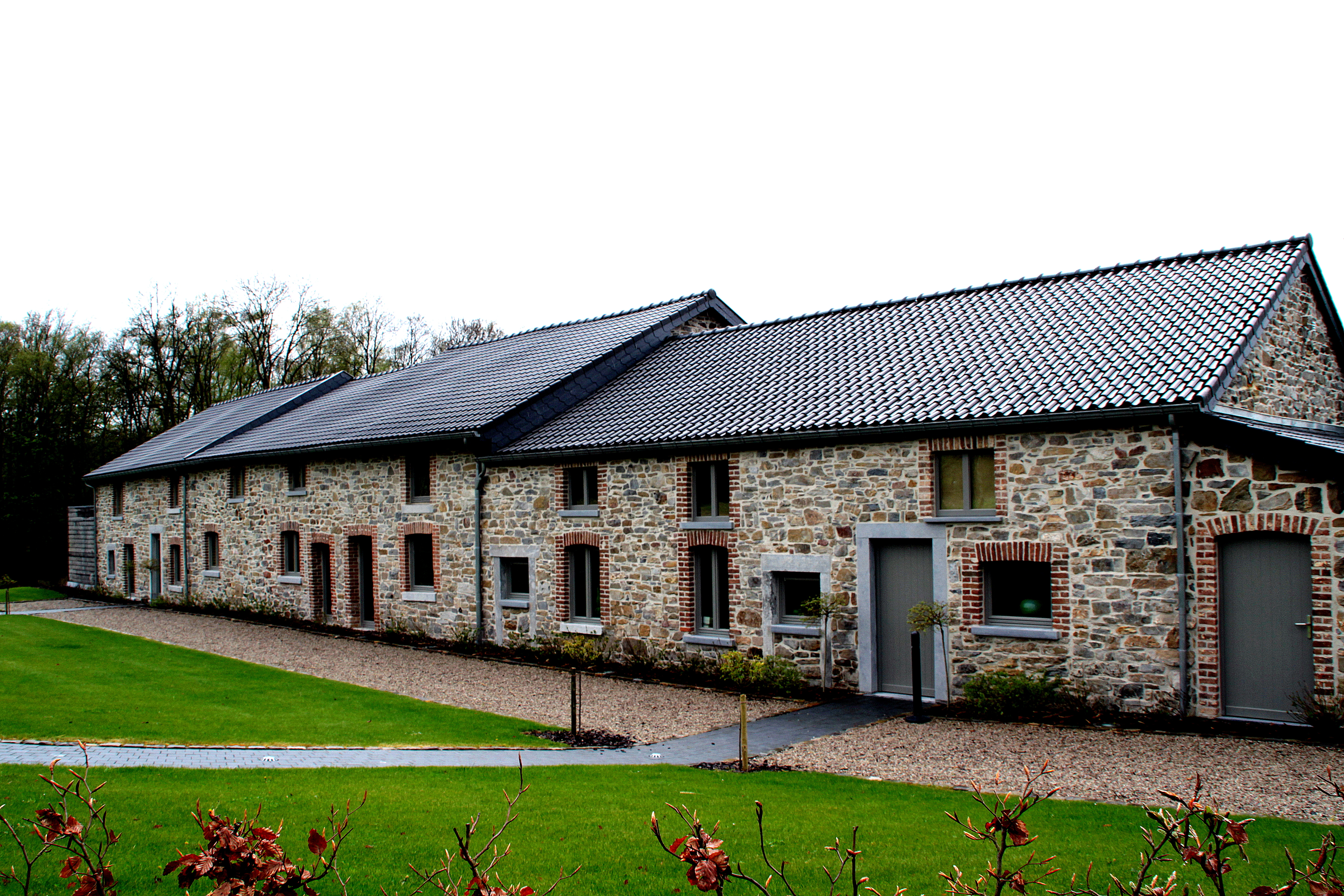 Gîte rural zu Ville-au-Bois